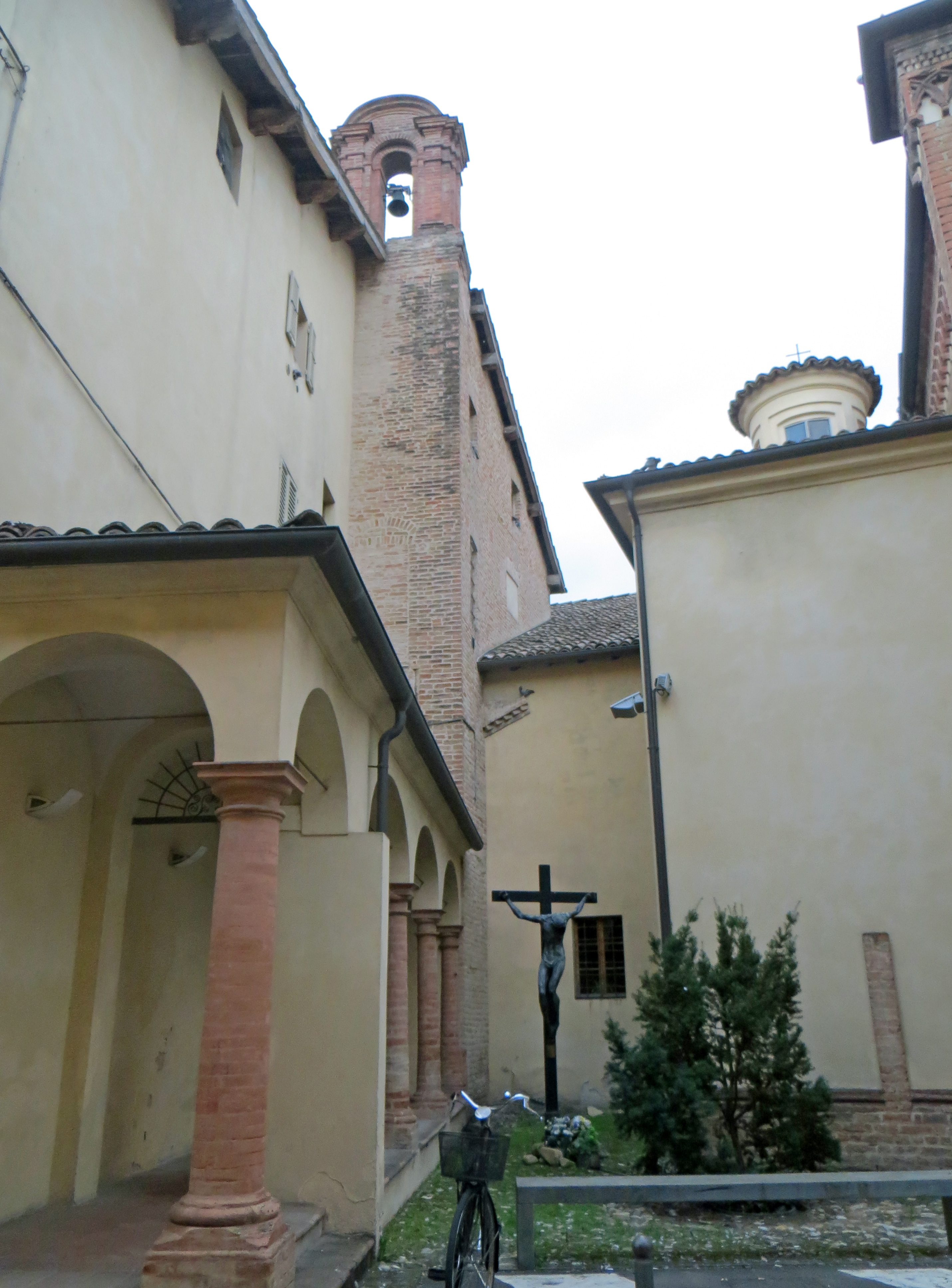 Chiesa di Santa Croce (Fontanellato) - Angolo del Cristo